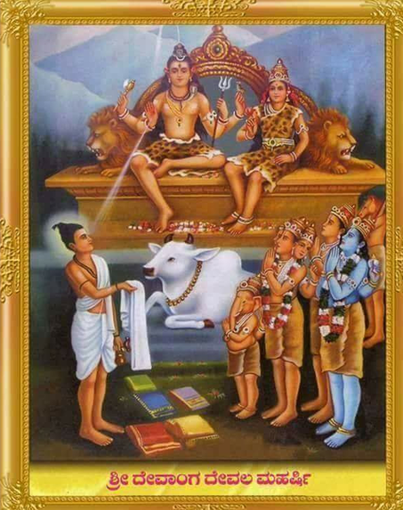 ಕನ್ನಡ: ತ್ರೈಲೋಕ್ಯದವರ ಮಾನ ರಕ್ಷಣೆಗೆ ವಸ್ತ್ರವಿಲ್ಲದಿರಲು, ಮತ್ತು ಜ್ಞಾನ ದೀಕ್ಷೆಗೆ, ಸೂತ್ರವಿಲ್ಲದಿರಲು, ಸಕಲ ಅನನ್ಯ ಪ್ರಾರ್ಥನೆಯ ಮೇರೆಗೆ, ಶಿವನ ಚಿಚ್ಚಕ್ತಿಯಿಂದ ಅವತರಿಸಿ, ಪ್ರಪಥಮವಾಗಿ ವಸ್ತ್ರ - ಸೂತ್ರ ನಿರ್ಮಿಸಿ ಕೊಟ್ಟು ಕರುಣಿಸಿದ ಶ್ರೀ ದೇವಲ ( ದೇವಾಂಗ ) ಮಹರ್ಷಿಗಳ ವಂಶಜರೇ ದೇವಾಂಗರು​.